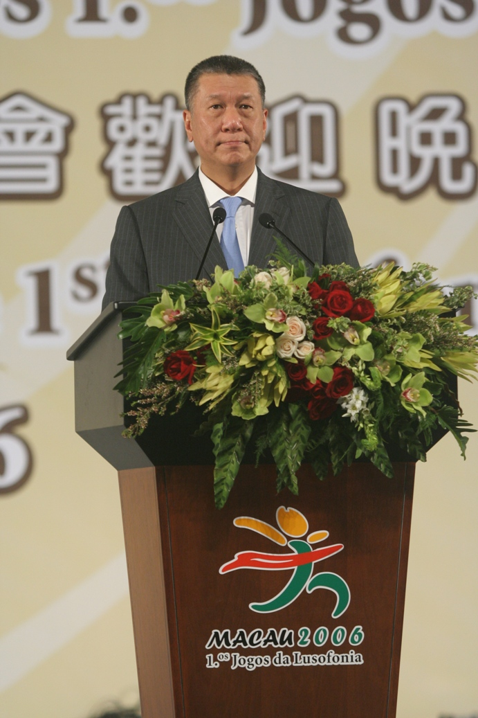 Edmond Ho em 1ª Jogas da Lusofonia